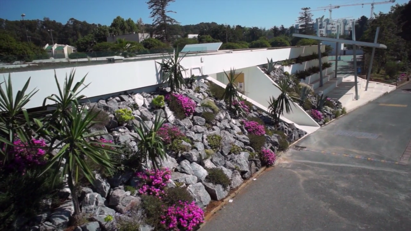 Entrée du CDI